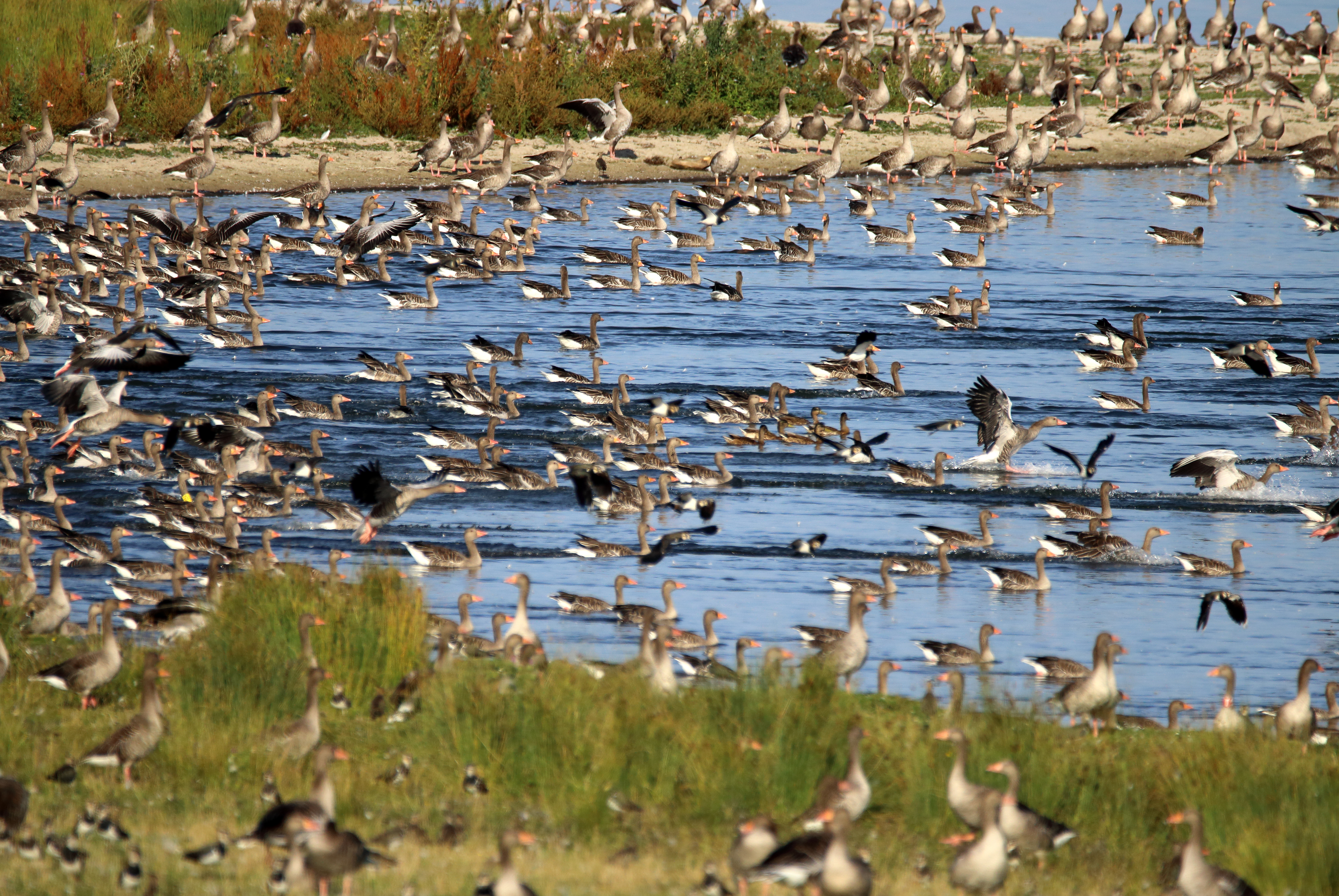 Großer Gänseschwarm auf dem Großen Schwerin in Mecklenburg